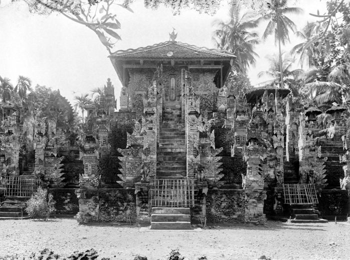 Negatief. De Pura Beji in Sangsit